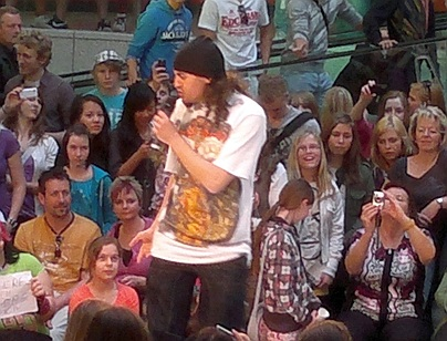 Menderes Bağcı in Magdeburg 2011